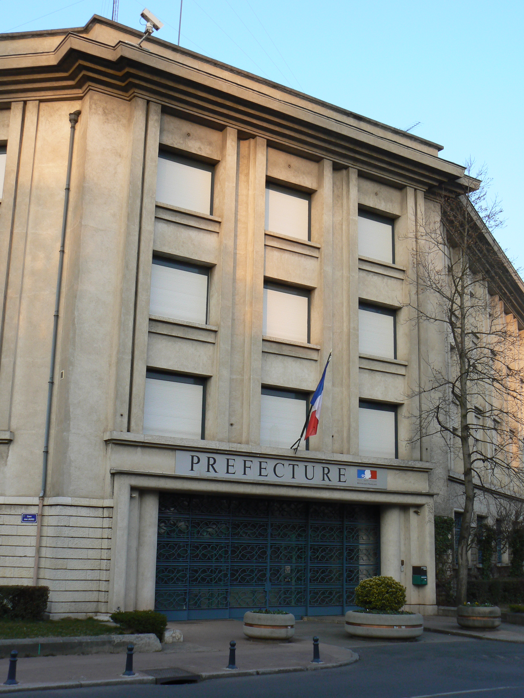 Hotel préfectoral de l'Allier